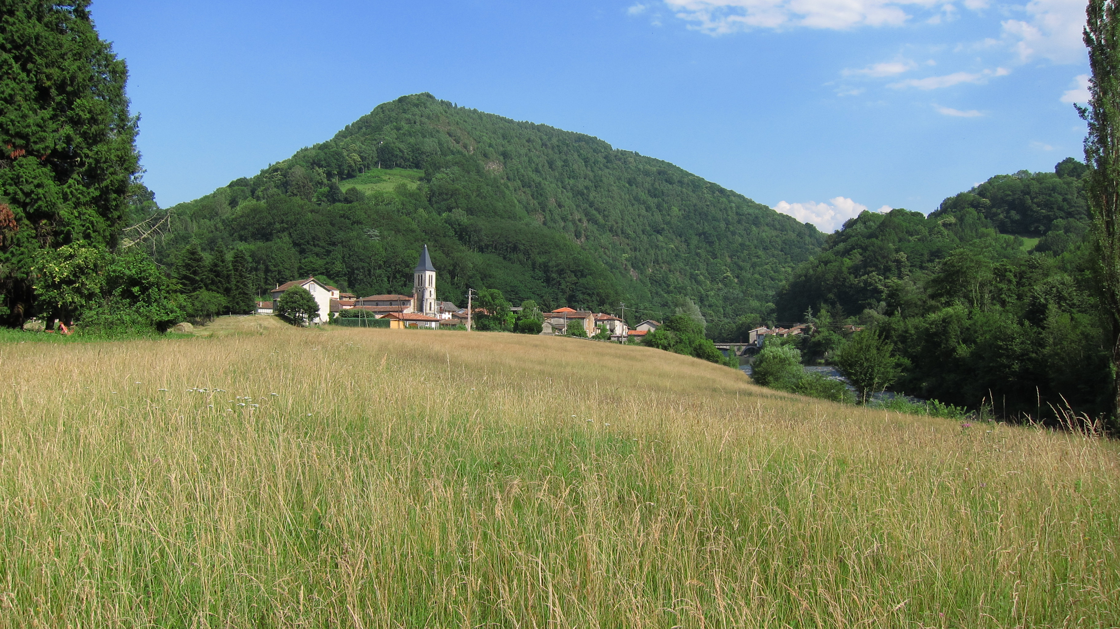 Lacourt (Ariège, France) : Un pré au bord du Salat et en arrière-plan, le village.